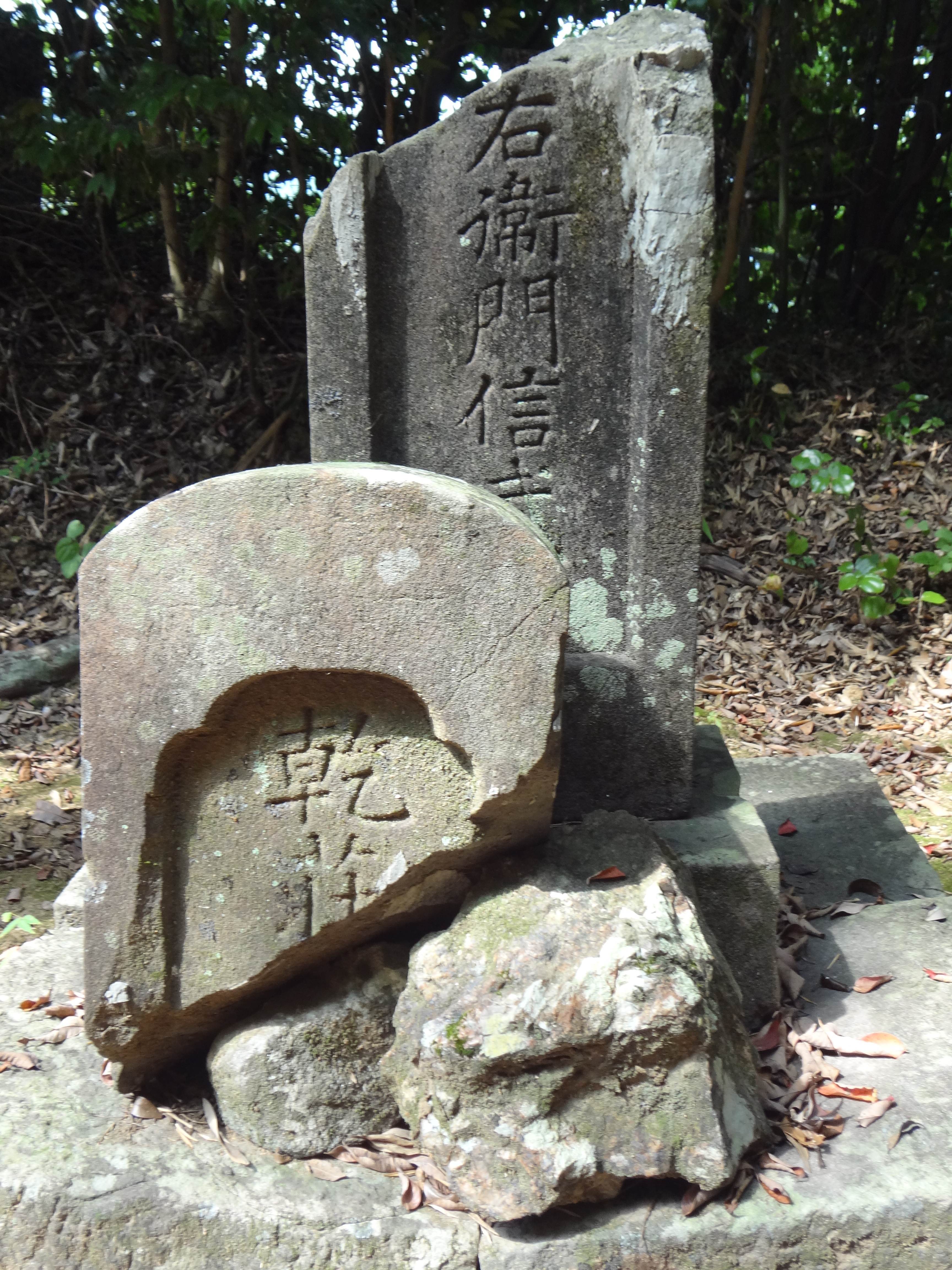 乾信武の妻(1779-1840)の墓。谷村久之丞自熈の娘。板垣退助の祖母。